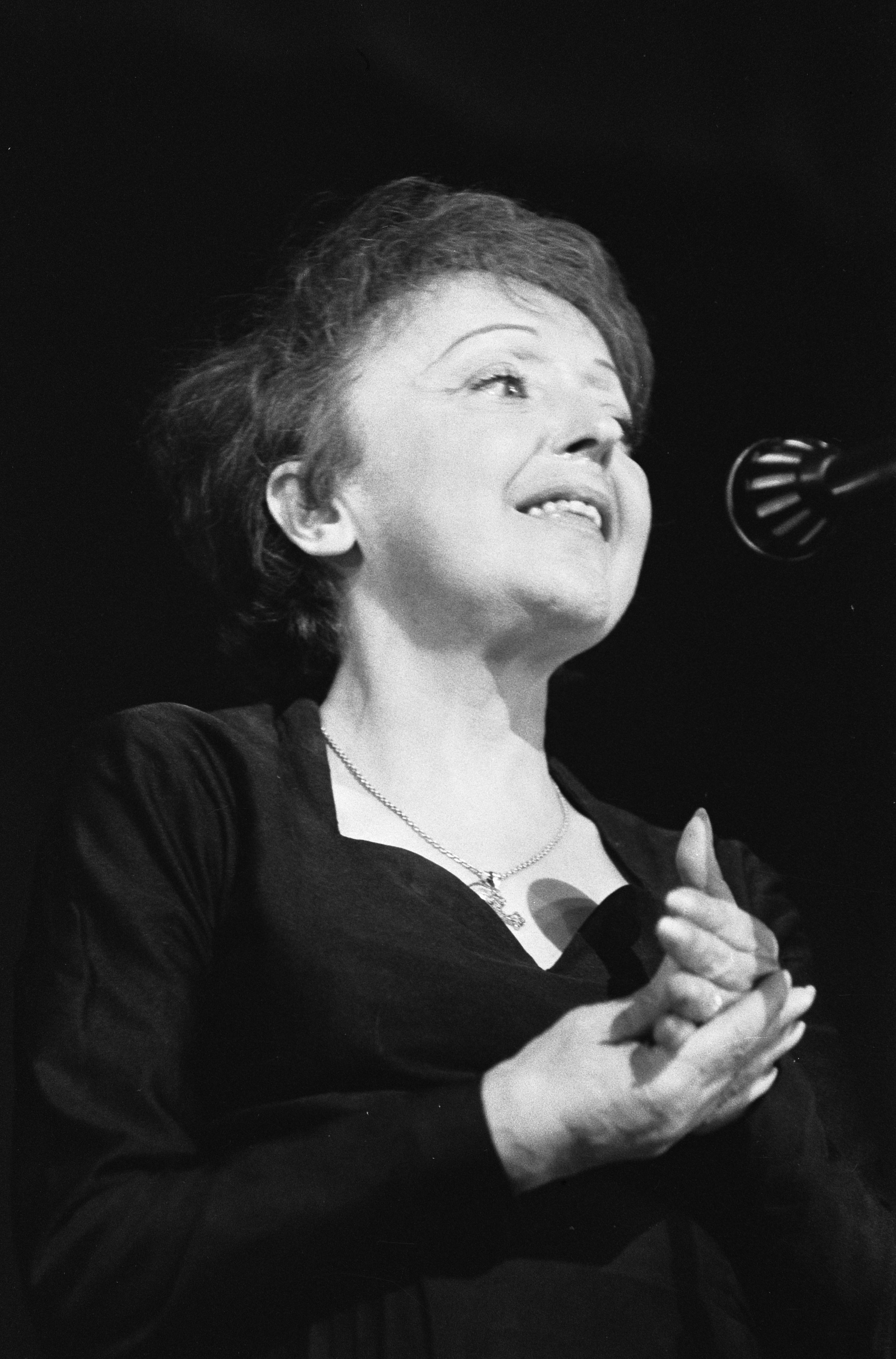 Édith Piaf tijdens een optreden in Rotterdam.